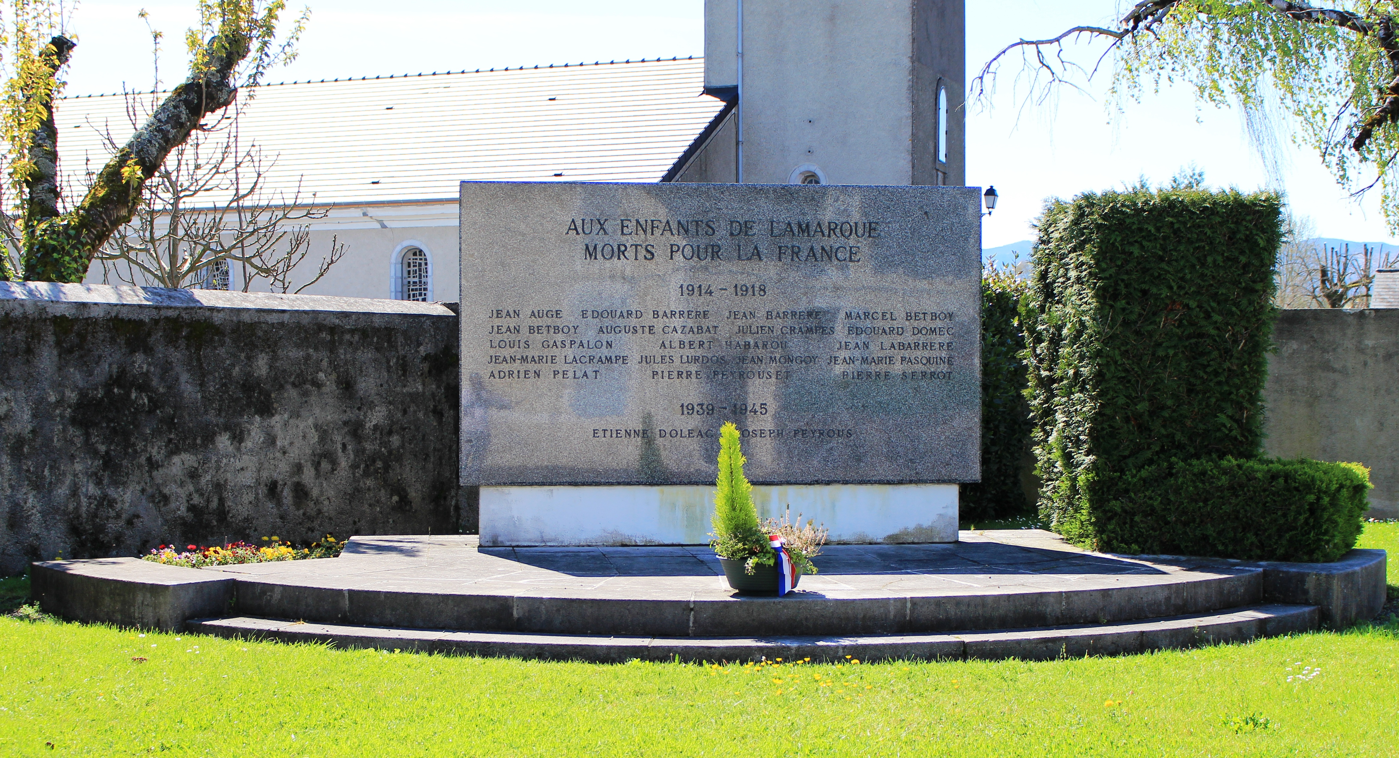 Monument aux morts de Lamarque-Pontacq (Hautes-Pyrénées)